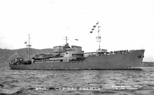 Le Cap des Palmes, ex-cargo bananier de la Compagnie maritime Fraissinet, patrouilleur auxiliaire FNFL